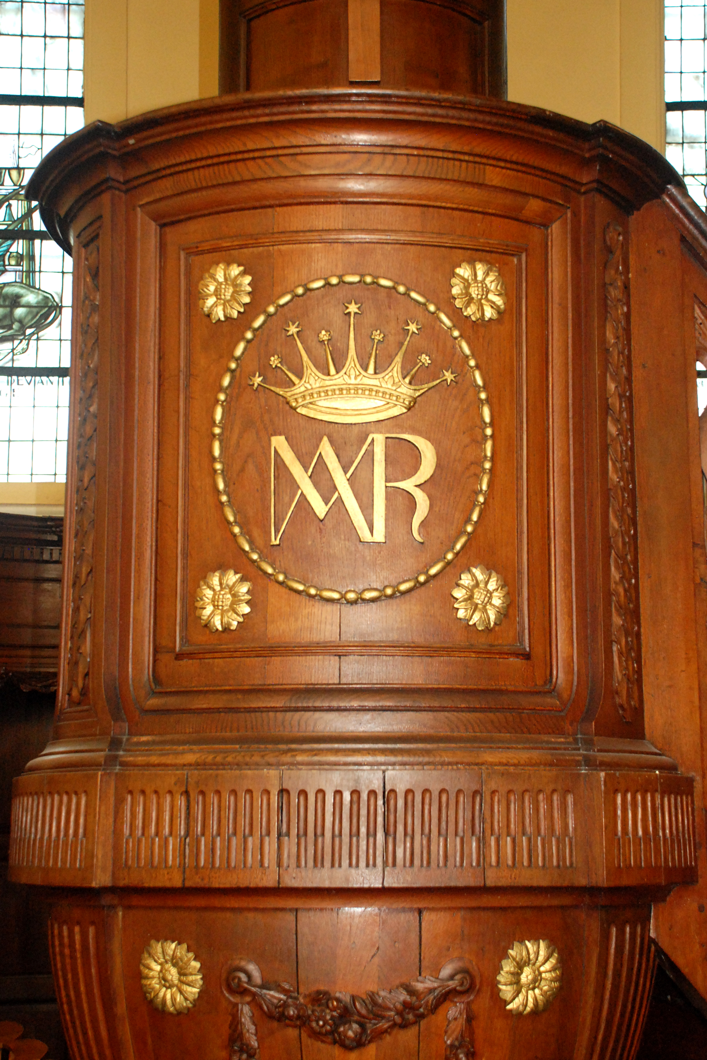 Belgique - Brabant wallon - Mont-Saint-Guibert - Église Saint-Guibert - la chaire de vérité